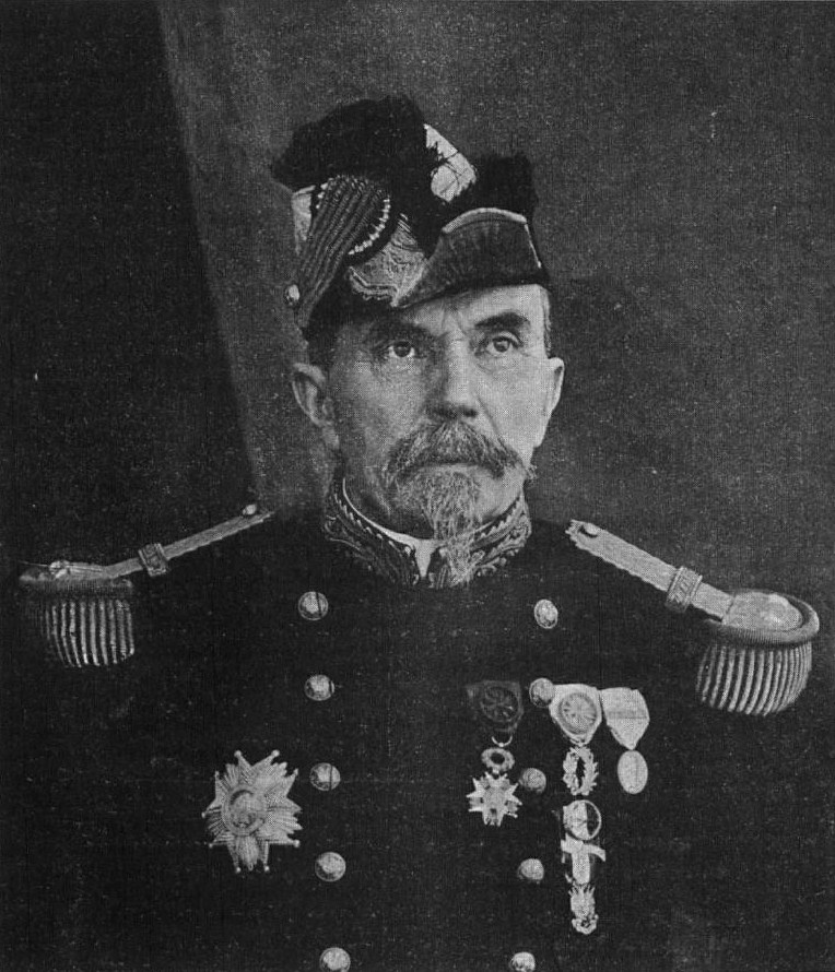 Le général Lambert (1834-1901), héros de Bazeilles, sénateur